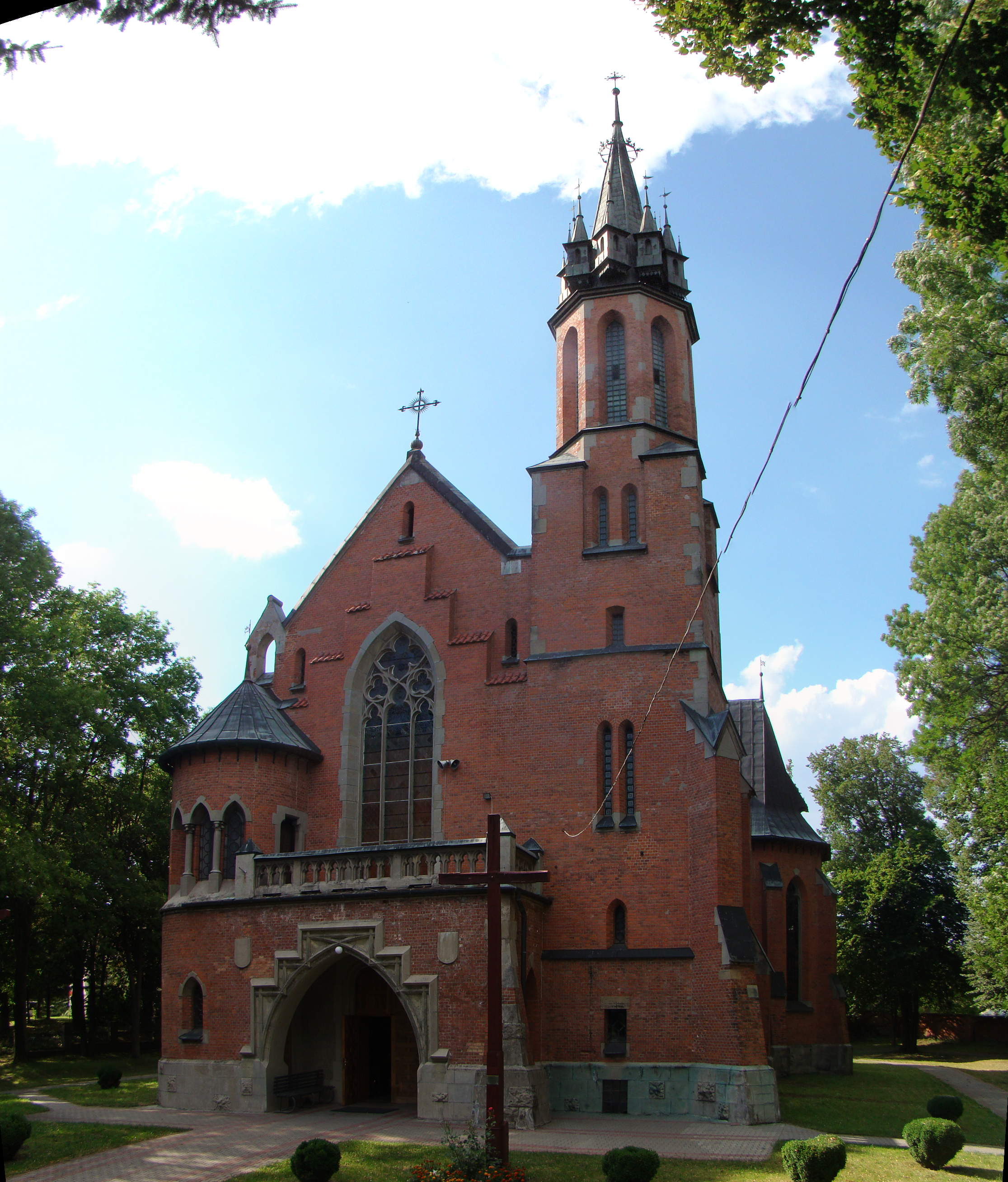 Kostel ve vesnici Dołhobyczów, Polsko